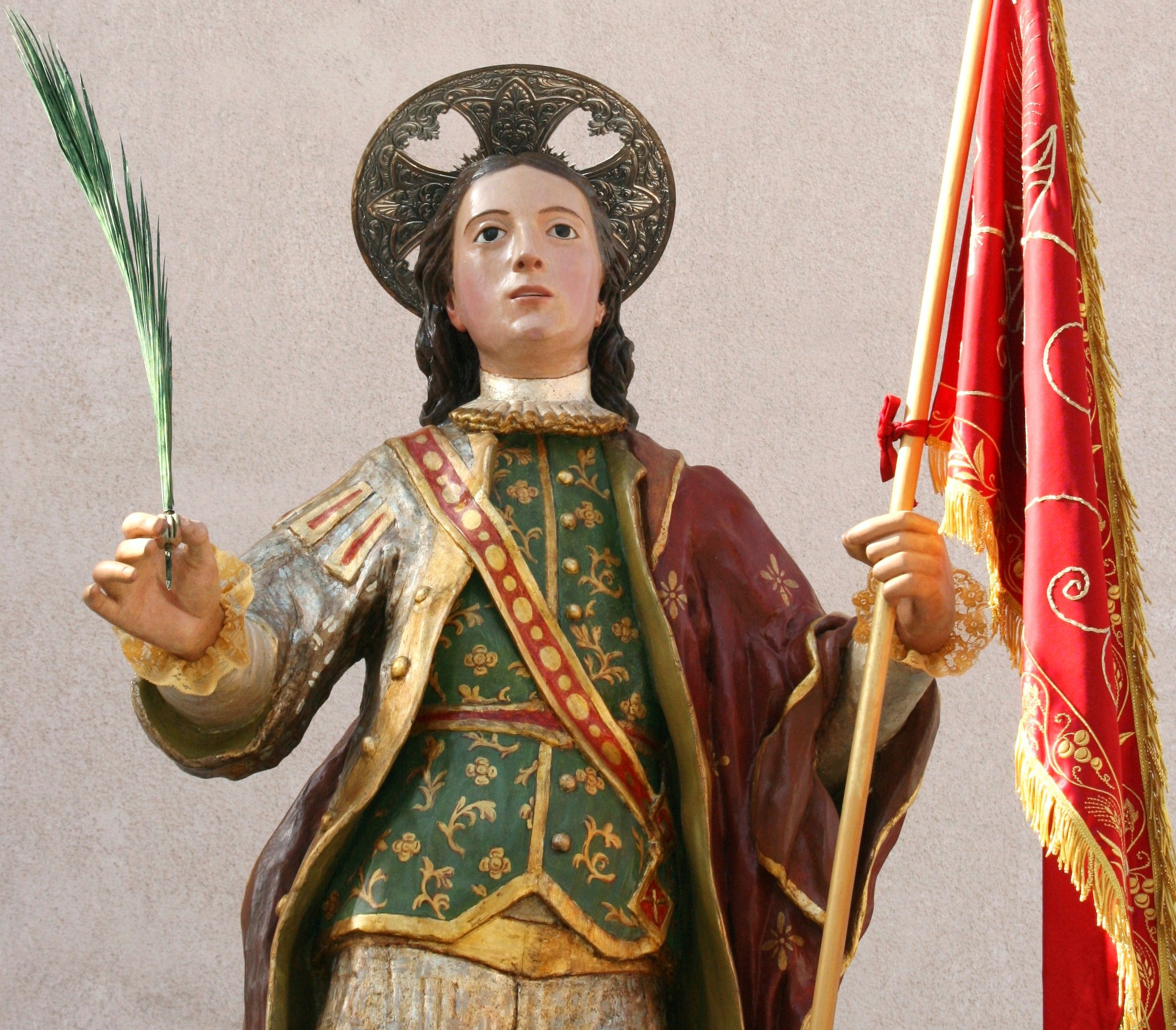 artistico simulacro ligneo del 1752 raffigurante San Prospero martire Patrono di Catenanuova (EN)